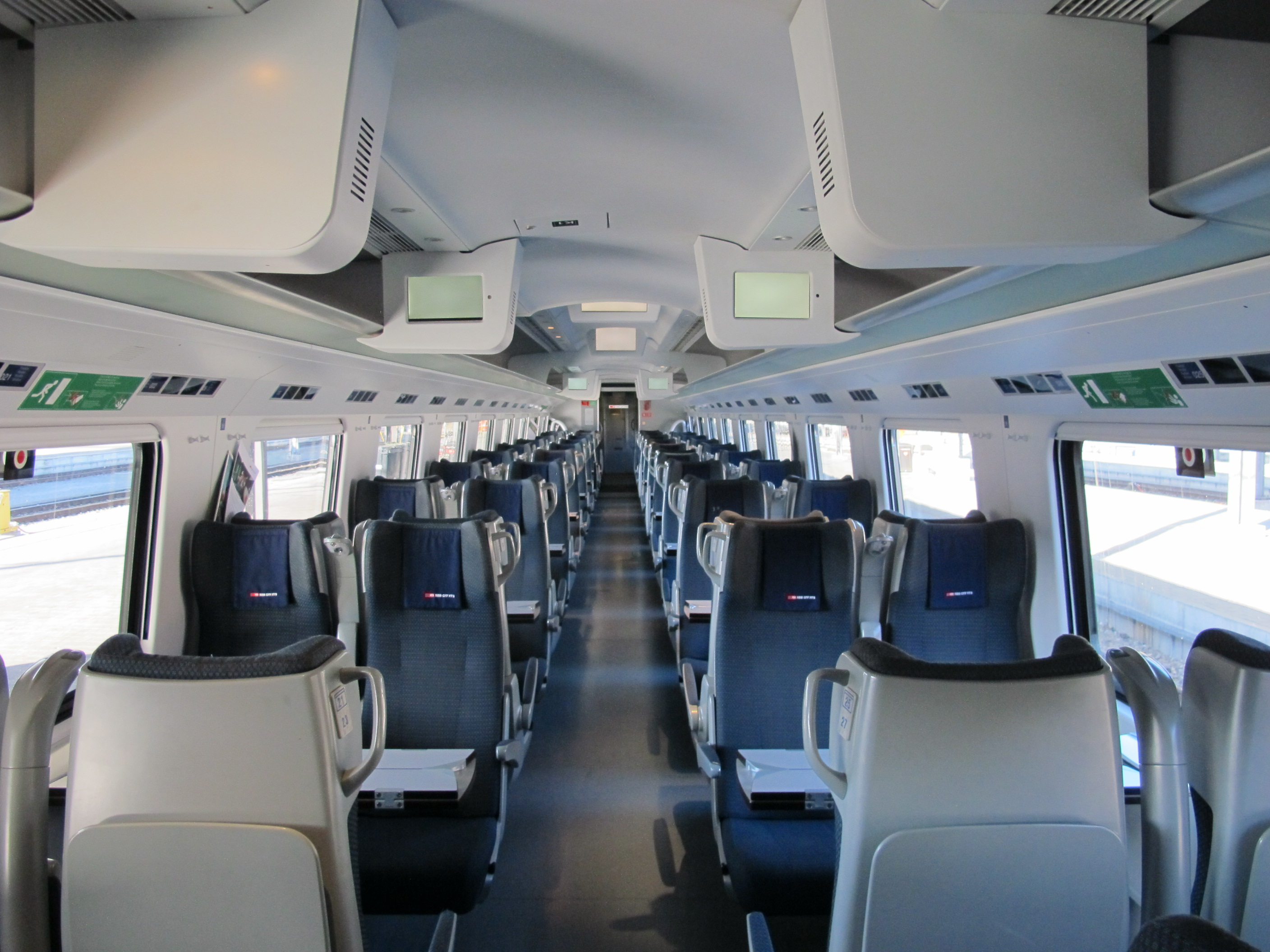 ETR 610 der SBB, Innenraum